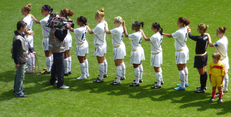 FIFA U-20-Fußballweltmeisterschaft der Frauen, Nationalmannschaft der USA, Spiel 28 in Augsburg